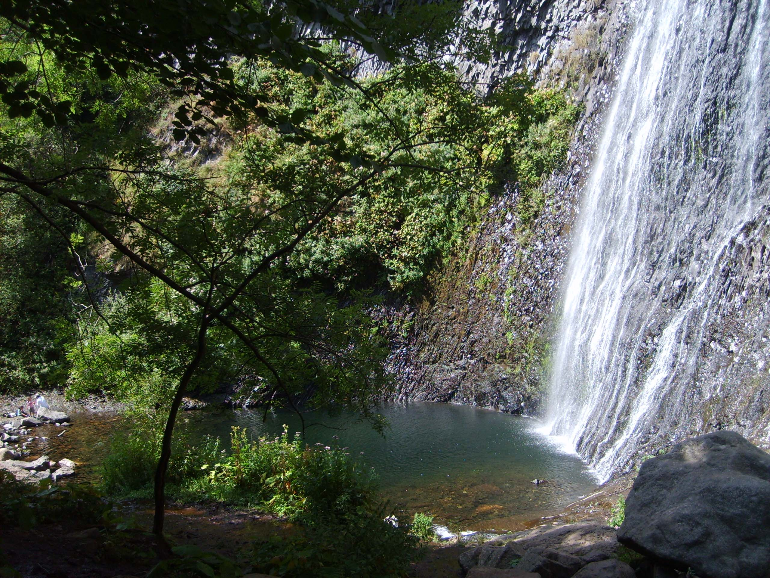 Cascade du Ray Pic en Ardèche